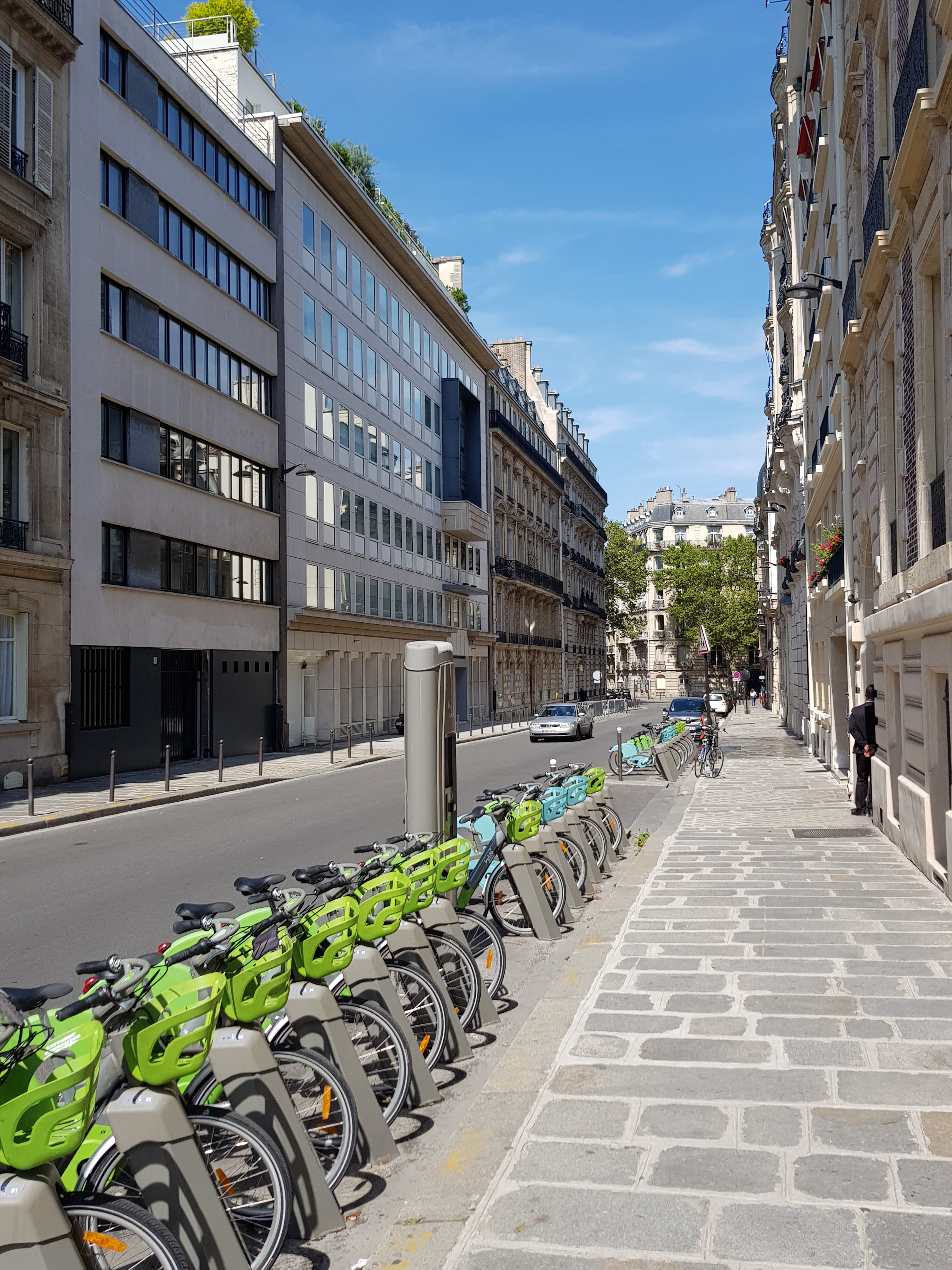 Rue Alfred-de-Vigny, Paris 8e.